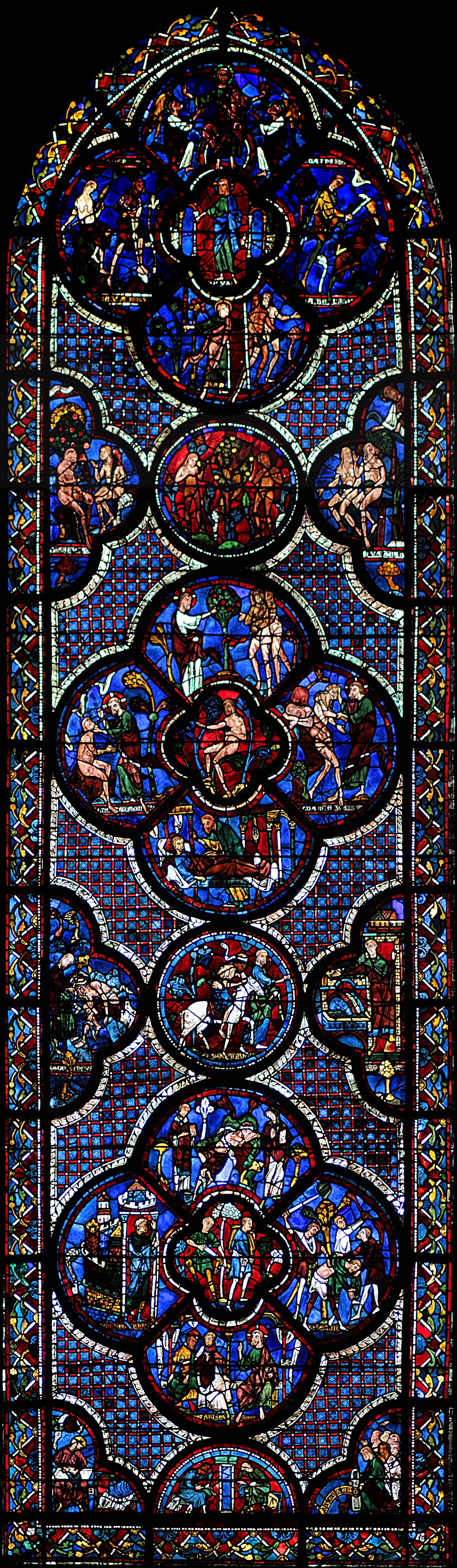 vitrail 44 de la cathédrale de Chartres - Le Bon Samaritain, Eure-et-Loir, France.